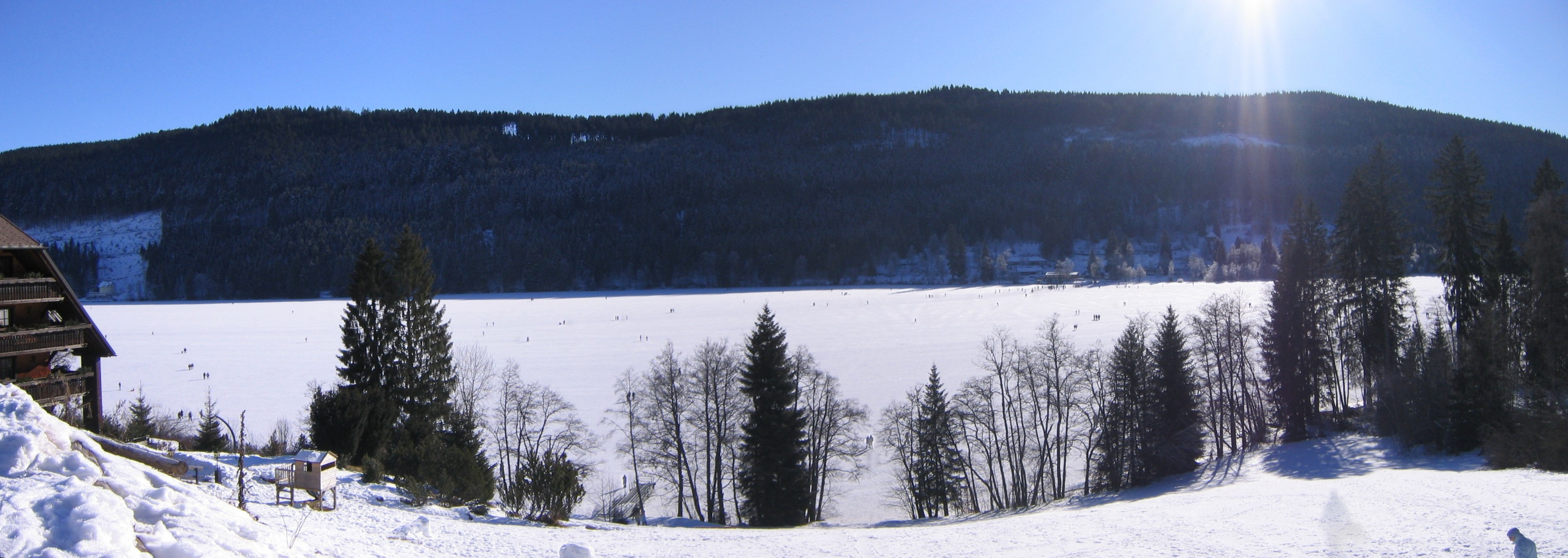 Panorama vom gefrorenen Titisee